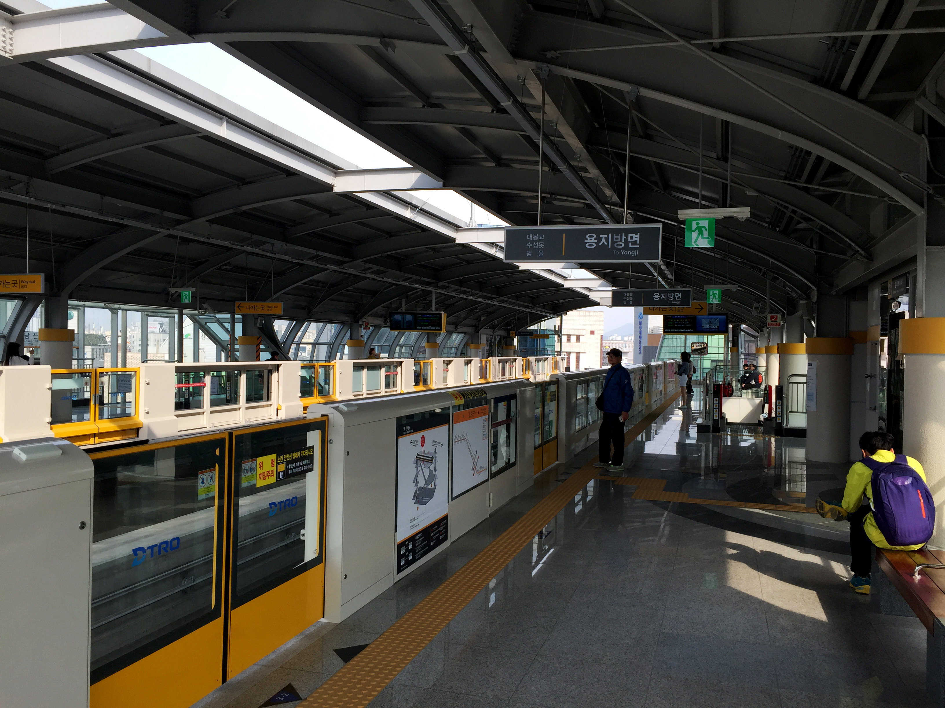 남산(계명네거리)역 승강장